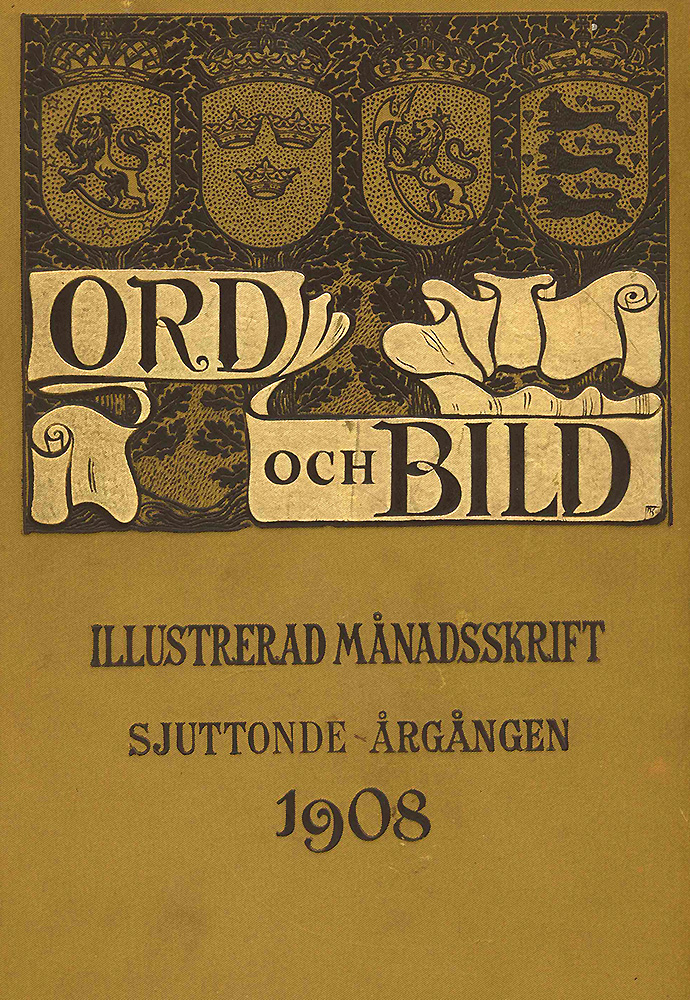 Ord och bild. Cover.